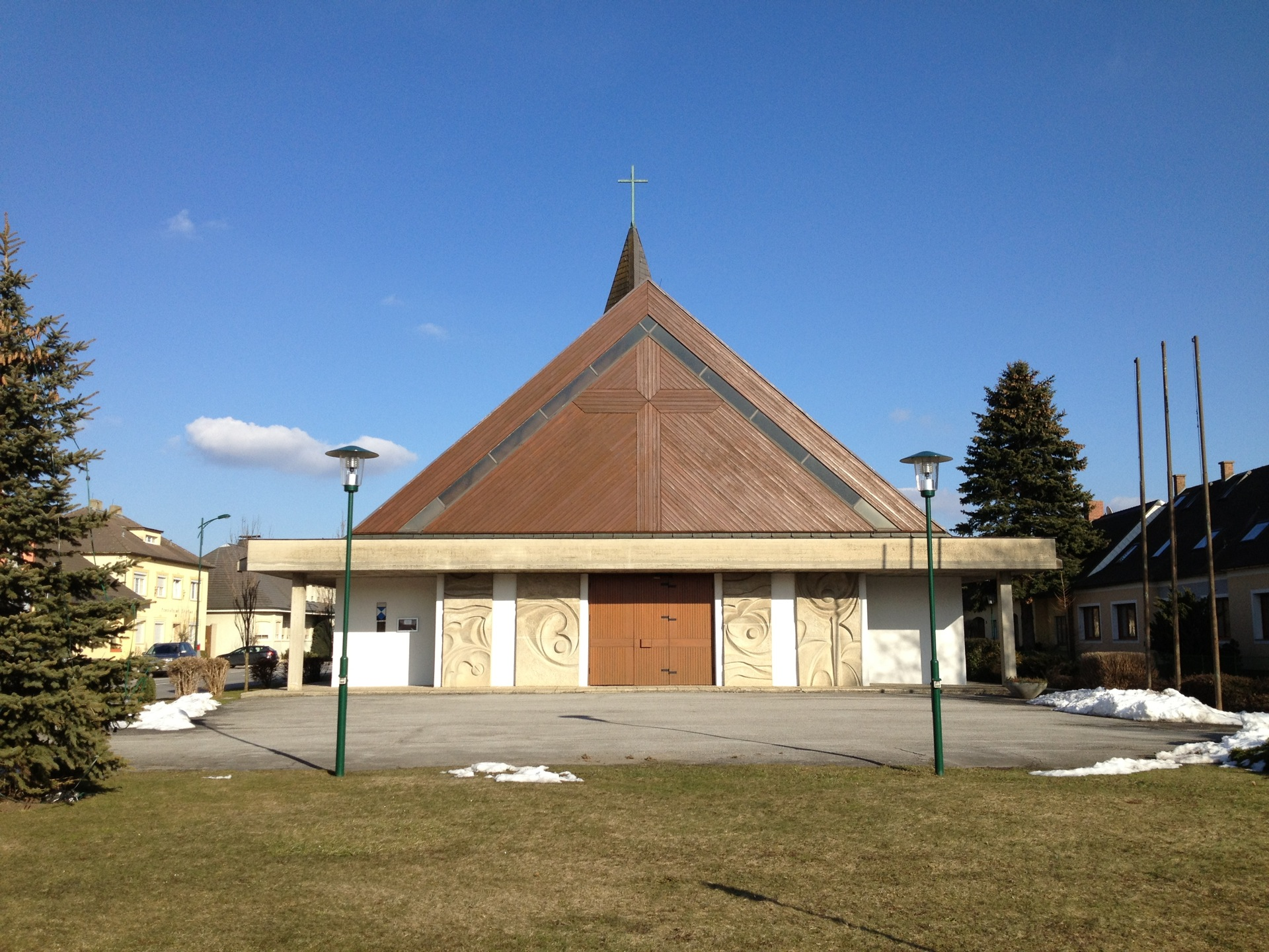 Filialkirche